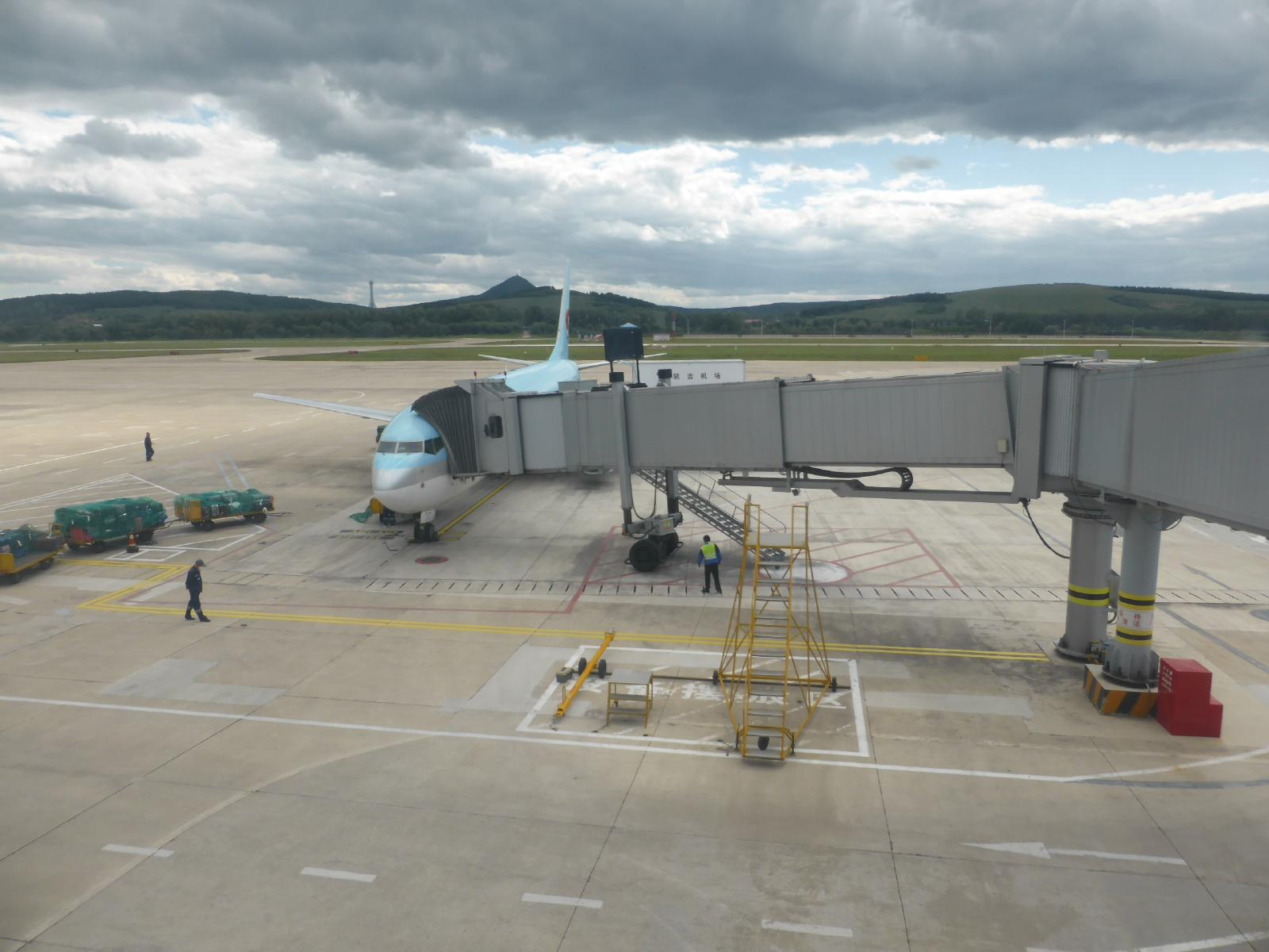 大韓航空と帽児山